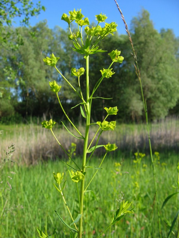 Esels-Wolfsmilch Euphorbia esula, Stoltera Nähe Rostock